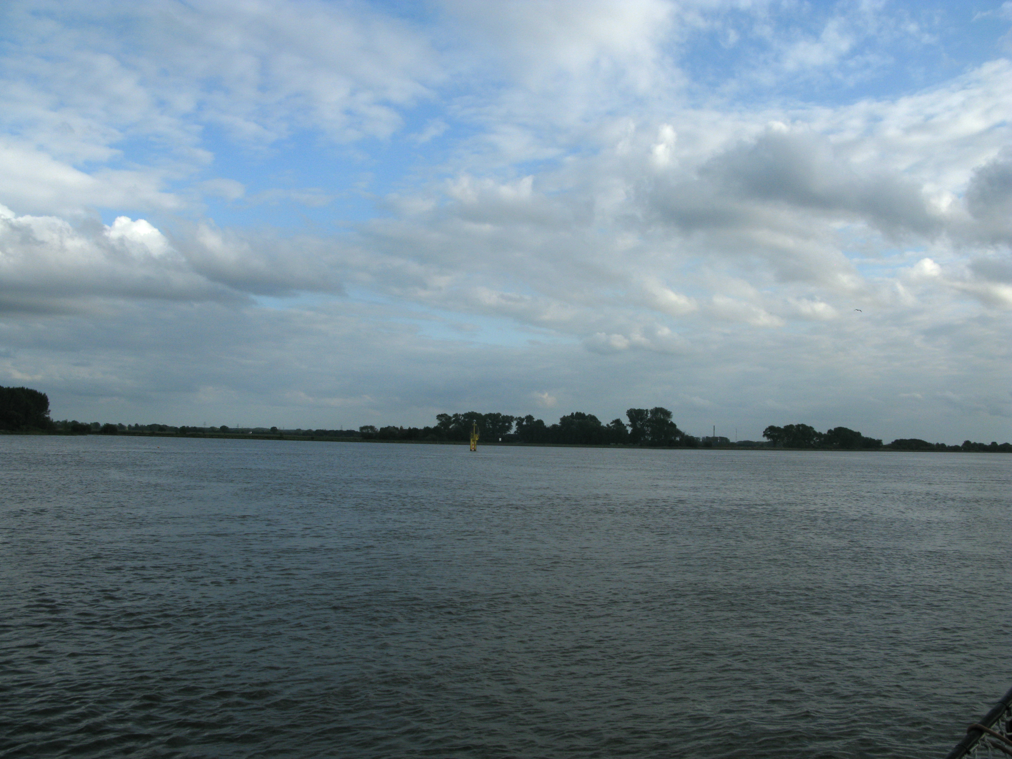 Weser-Pegel Fährplate